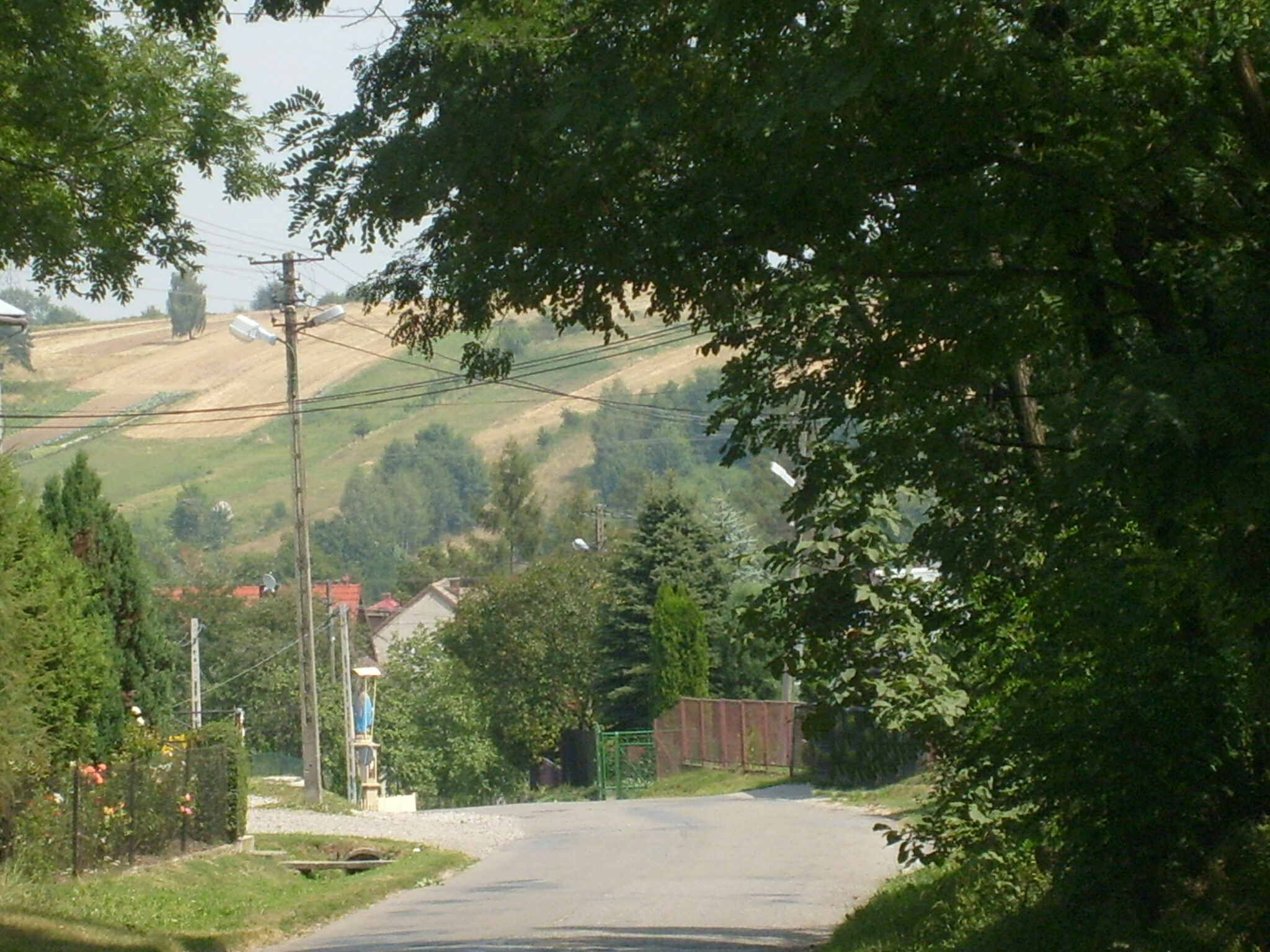 Bodzanów widok na Pańską Górę